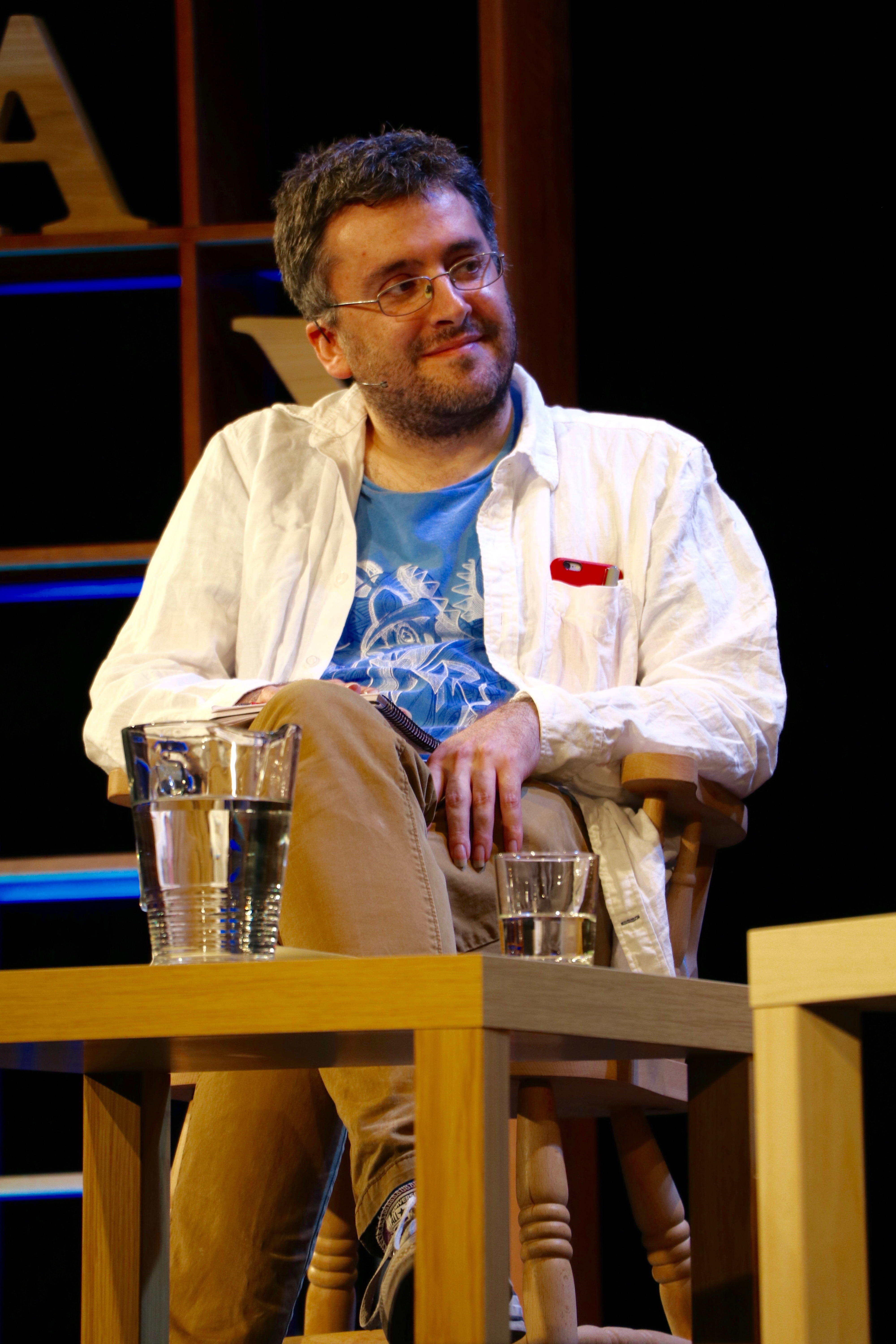 Hay Festival 2016 - Daniel Hahn